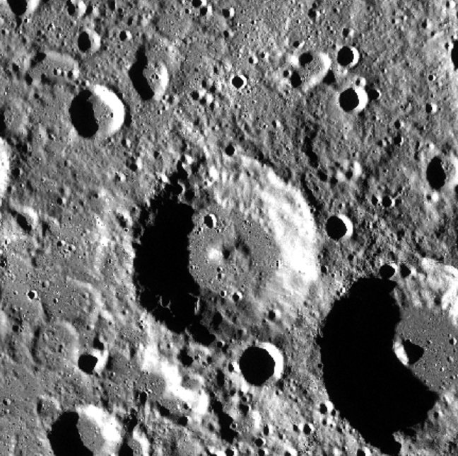 Cráter lunar Froelich. (Imagen LRO)